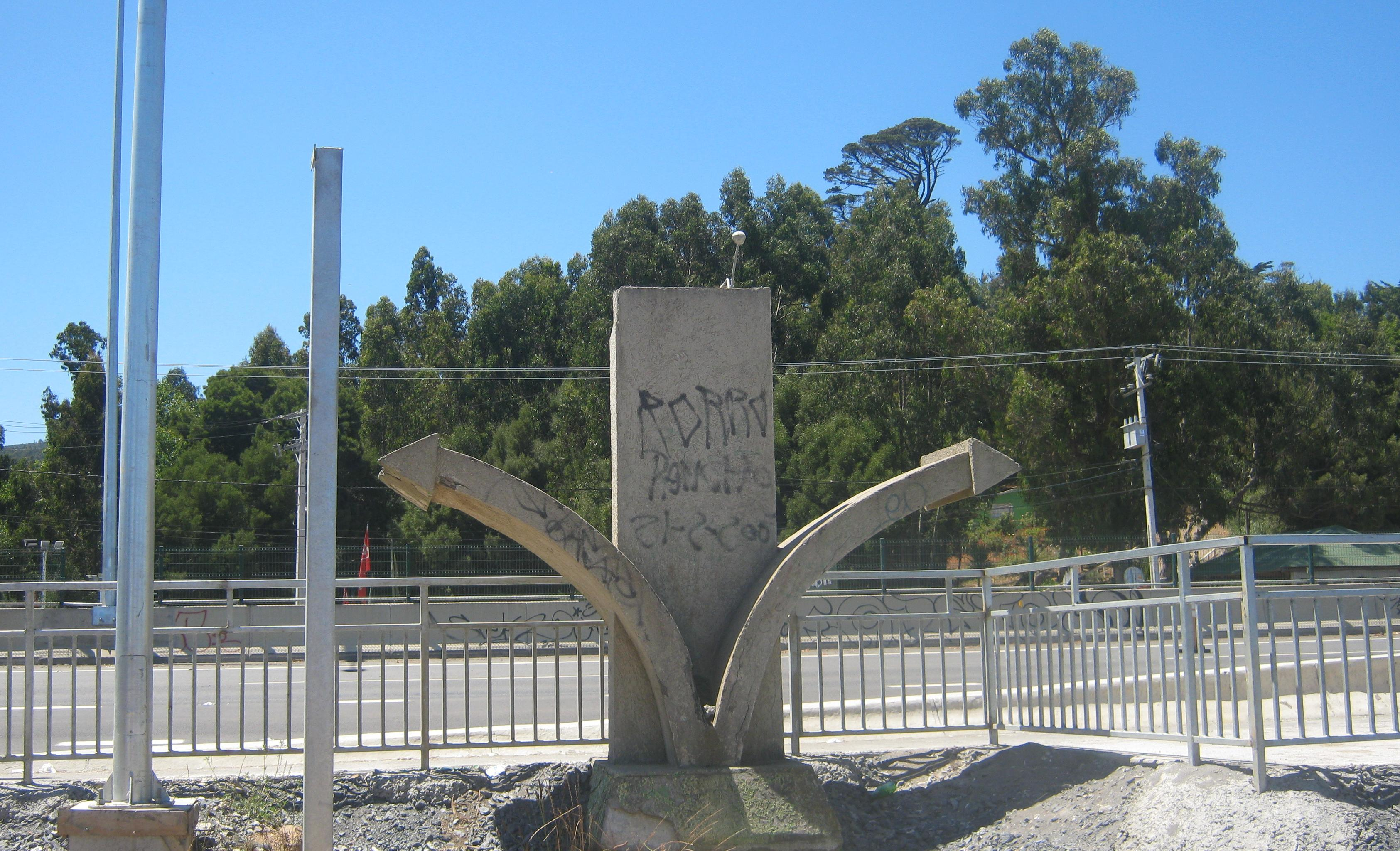 Monolito que marca la mitad geográfica de Chile continental, en Playa Blanca, Coronel